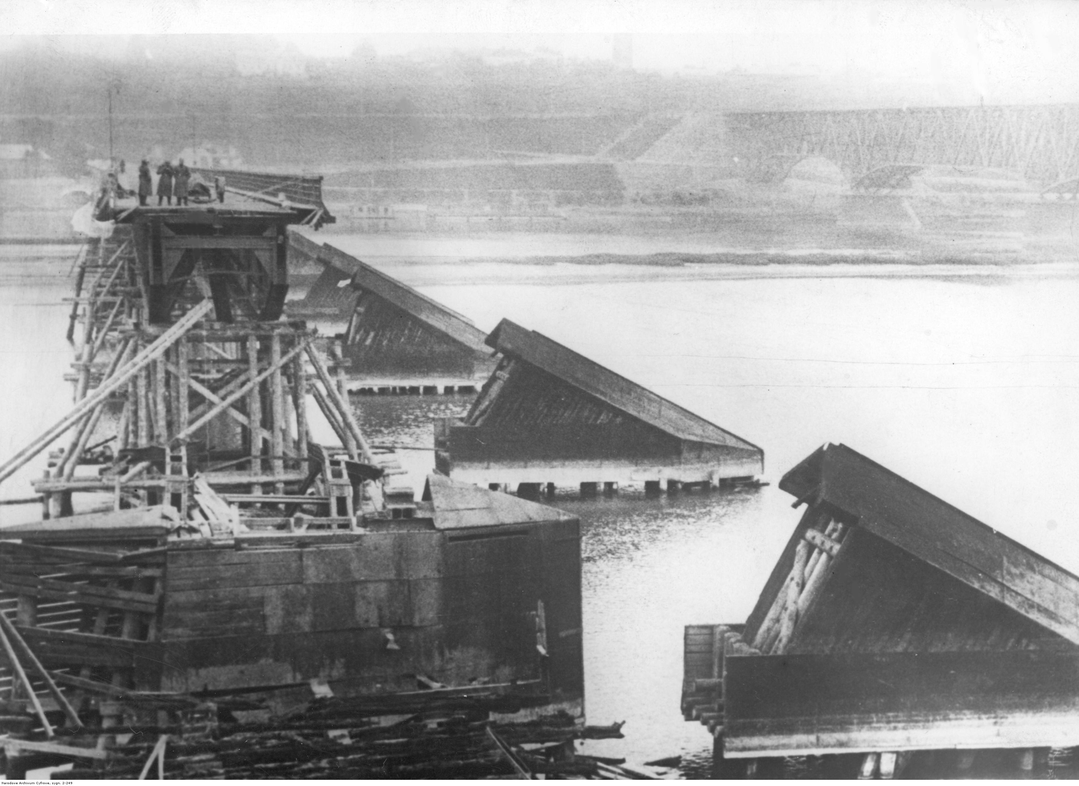 Zniszczony most na Wiśle w Płocku.